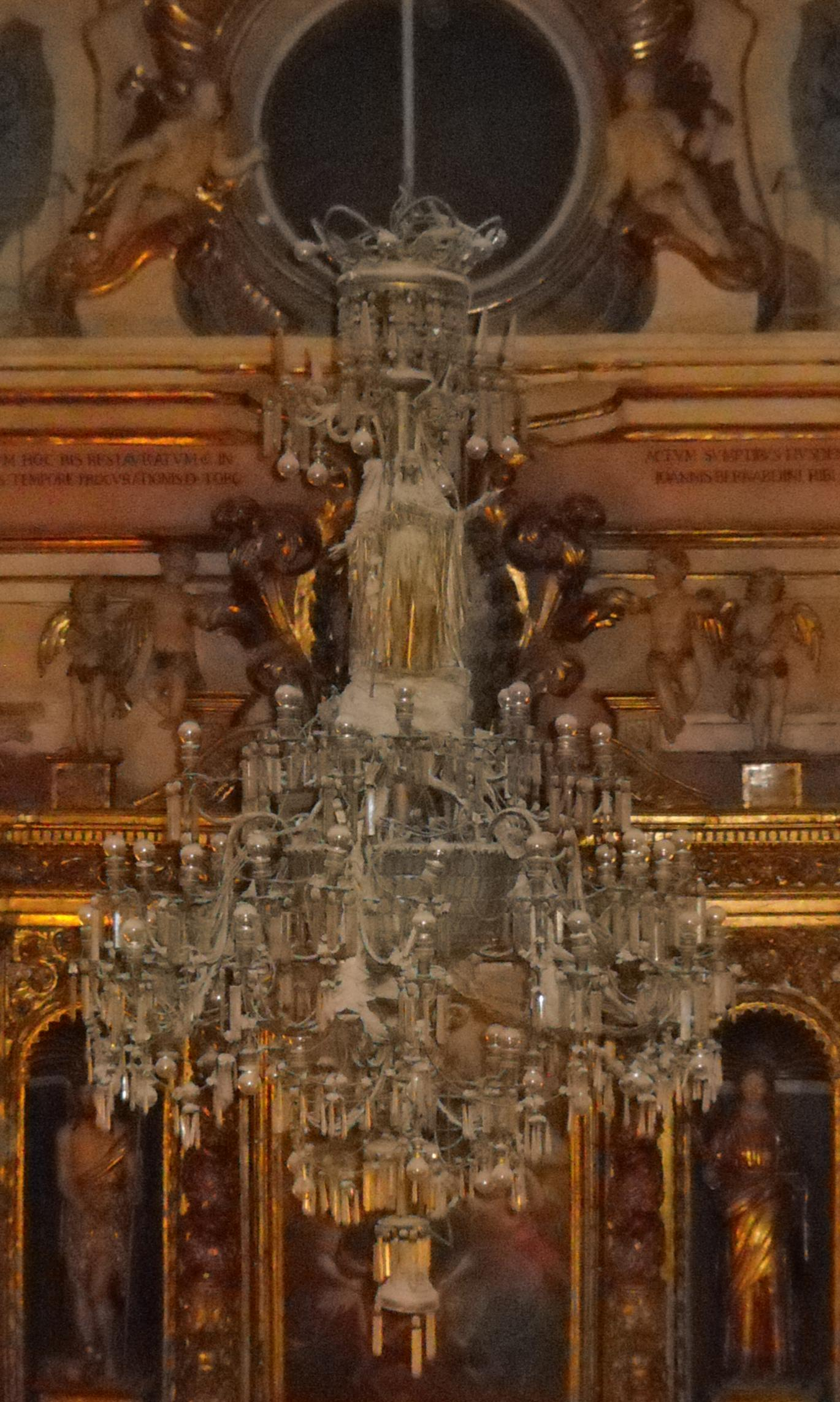 Il lampadario presente nella chiesa della SS. Annunziata, incredibilmente simile a quello del Teatro Comunale